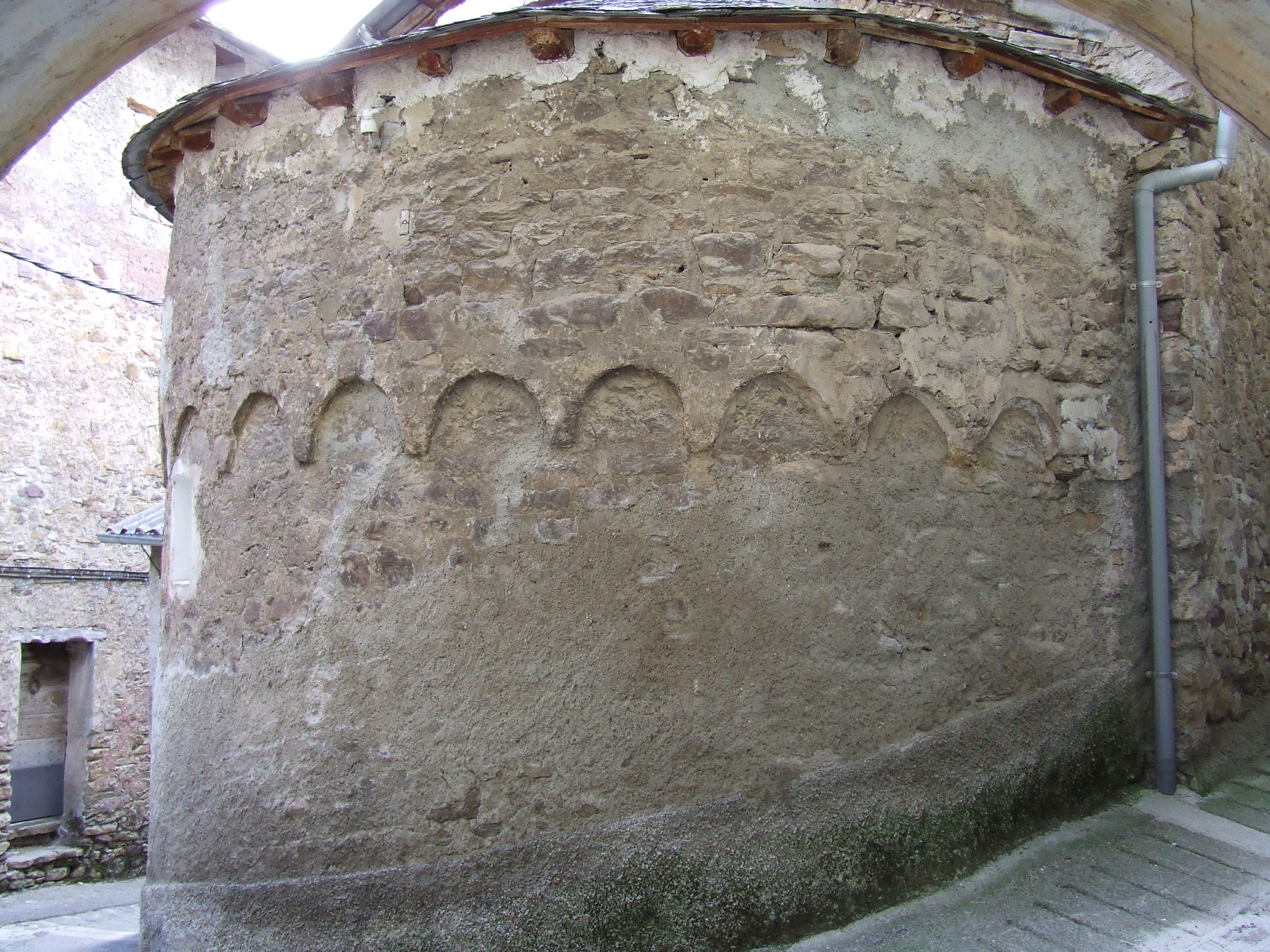 Santa Maria d'Oveix (la Torre de Cabdella, Pallars Jussà)